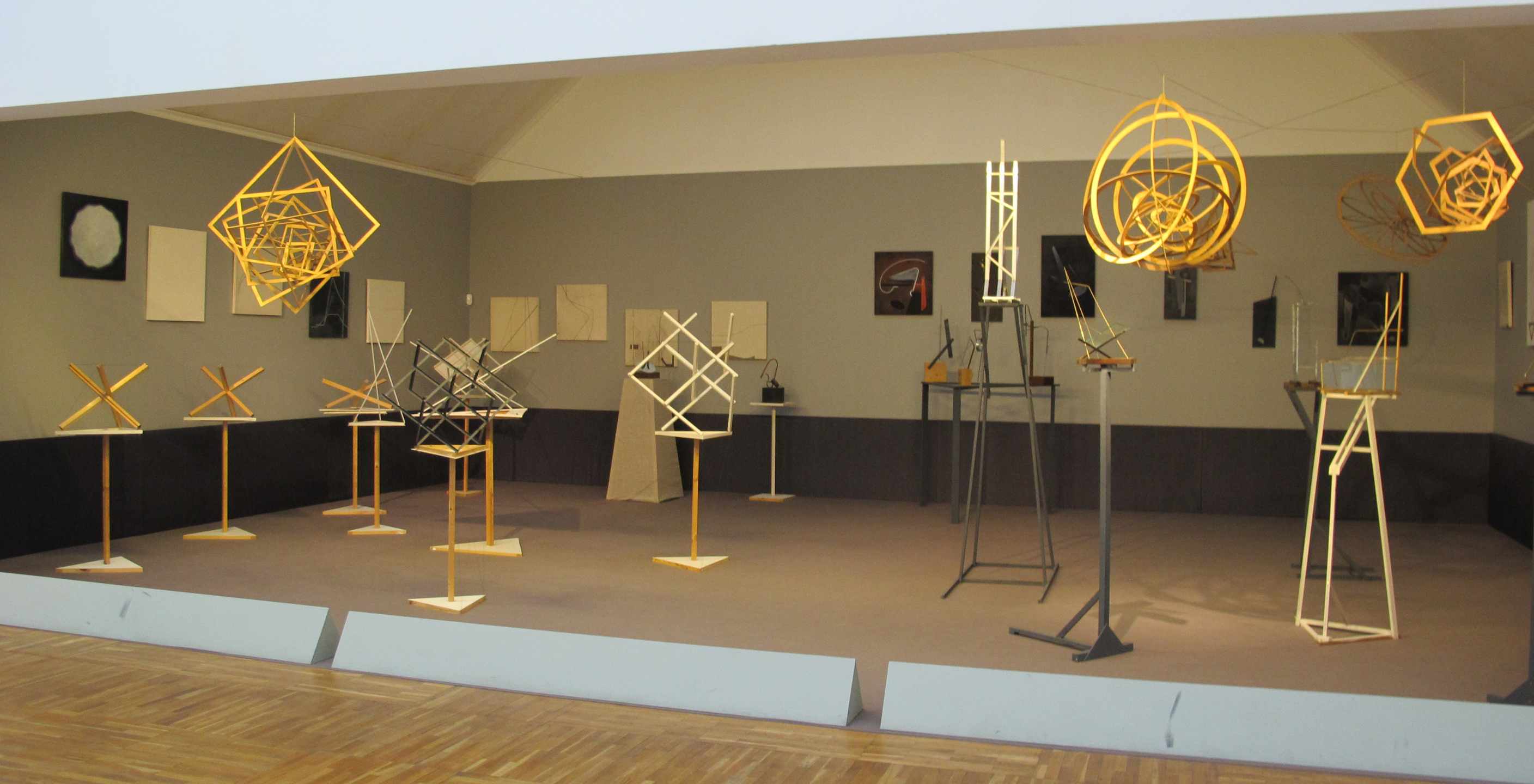 Installazione della ricostrizione dell'esibiz OBMOkHU del 1921